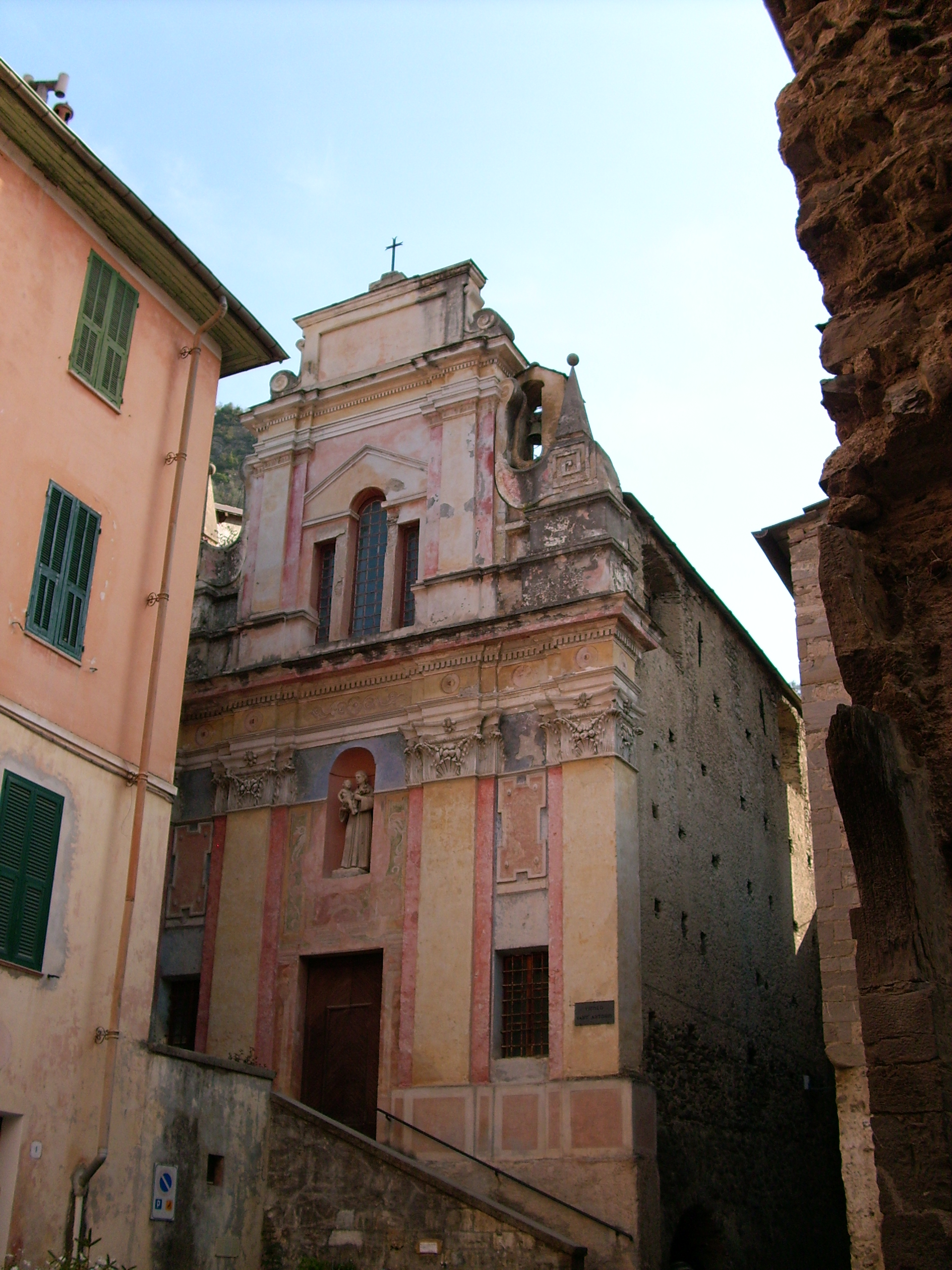 Oratorio di Sant'Antonio Abate di Pigna (IM), Liguria, Italia